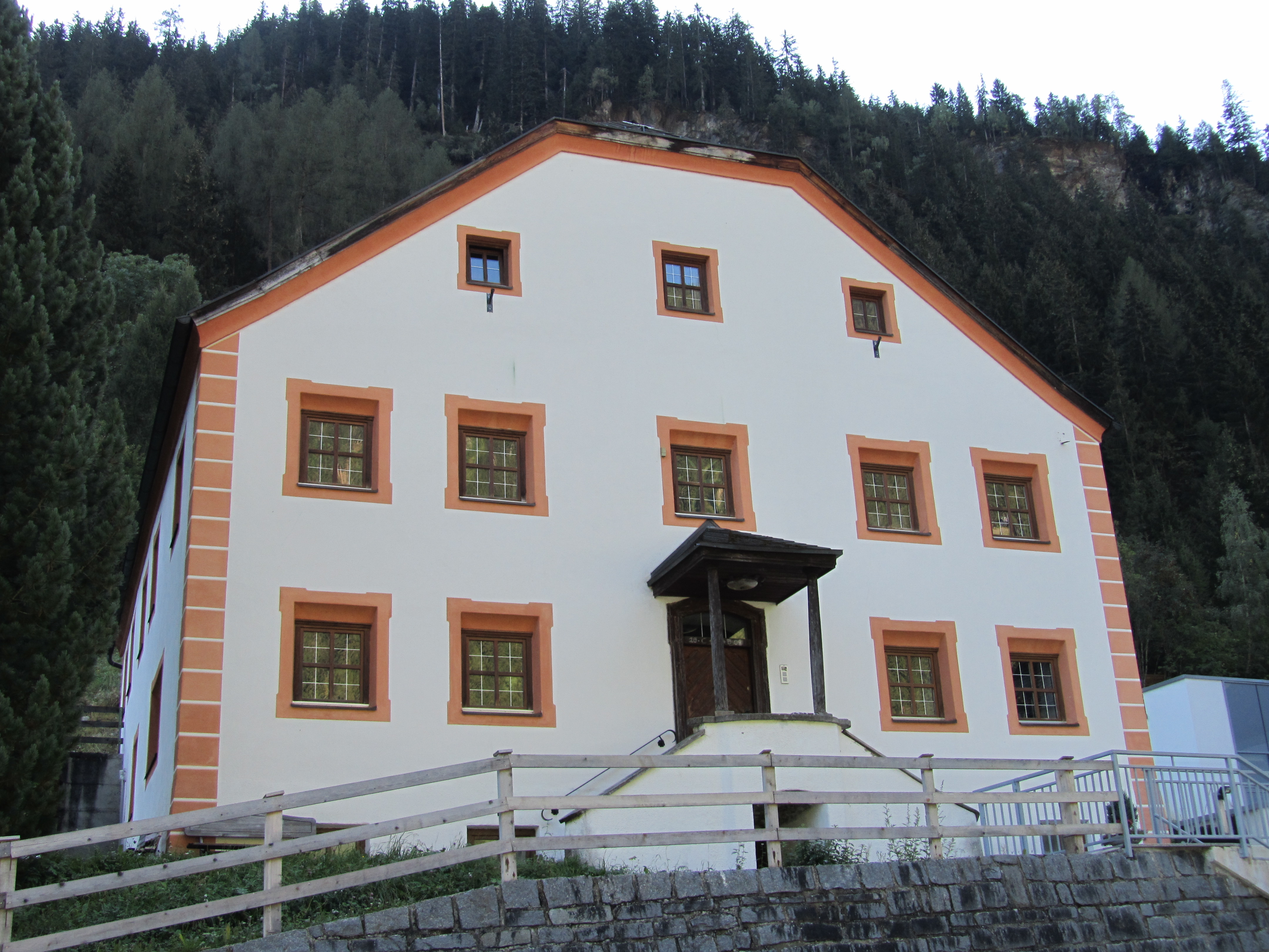 Widum (Pfarrhof) in der Gemeinde See im Bezirk Landeck